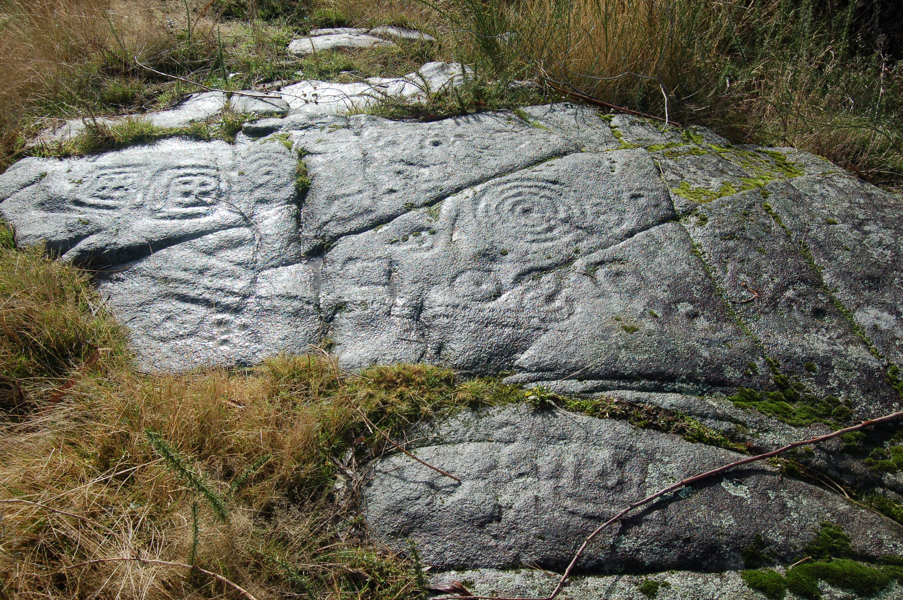 petróglifos de Portela da Laxe en Viascón, Cotobade